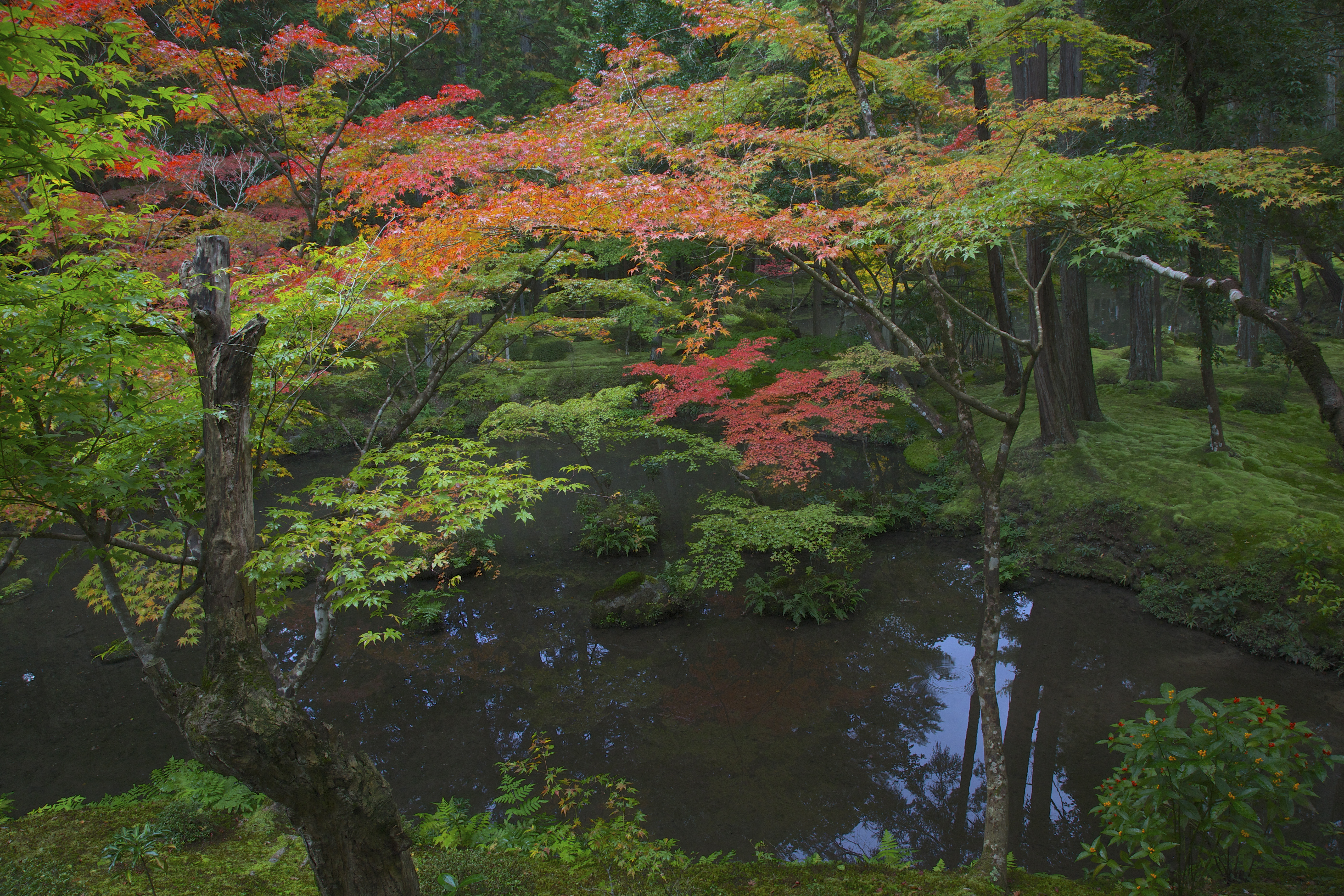 西芳寺（京都市西京区）